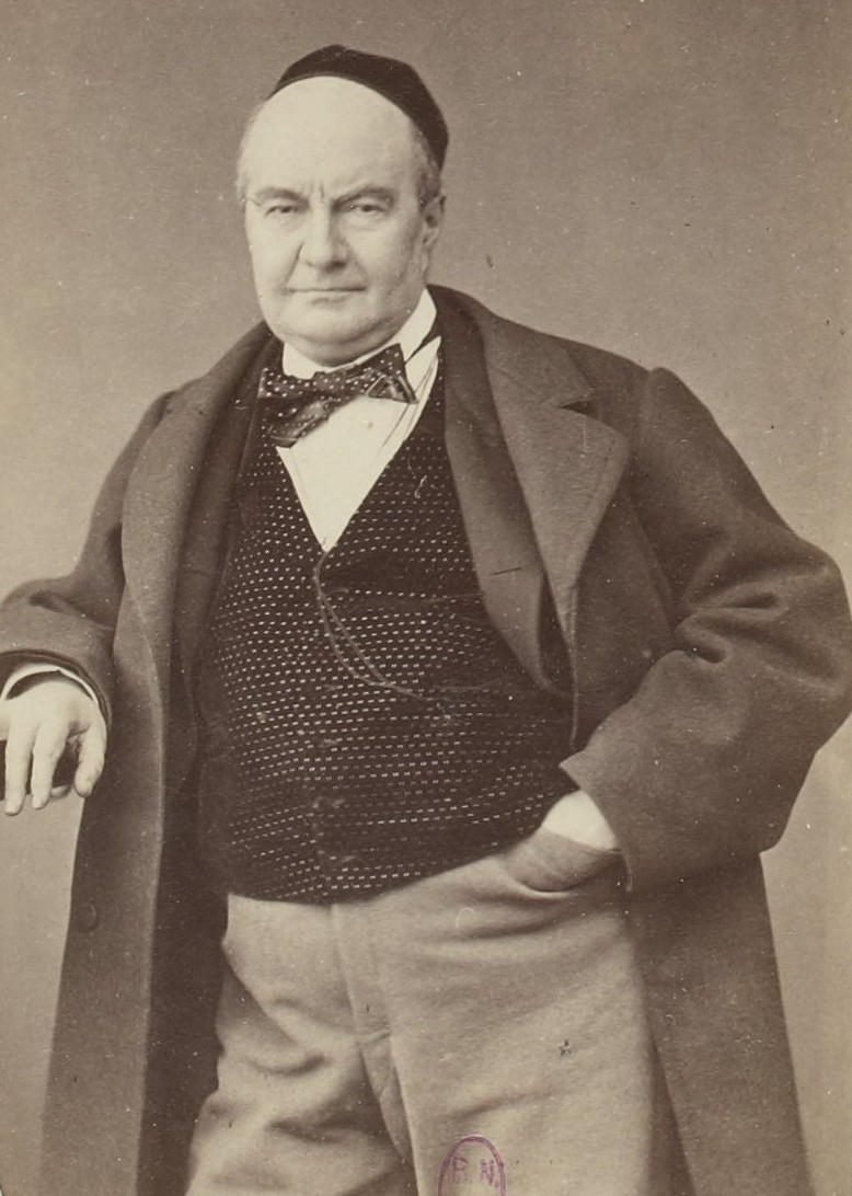 Personnalités françaises et étrangères sous le Second Empire.